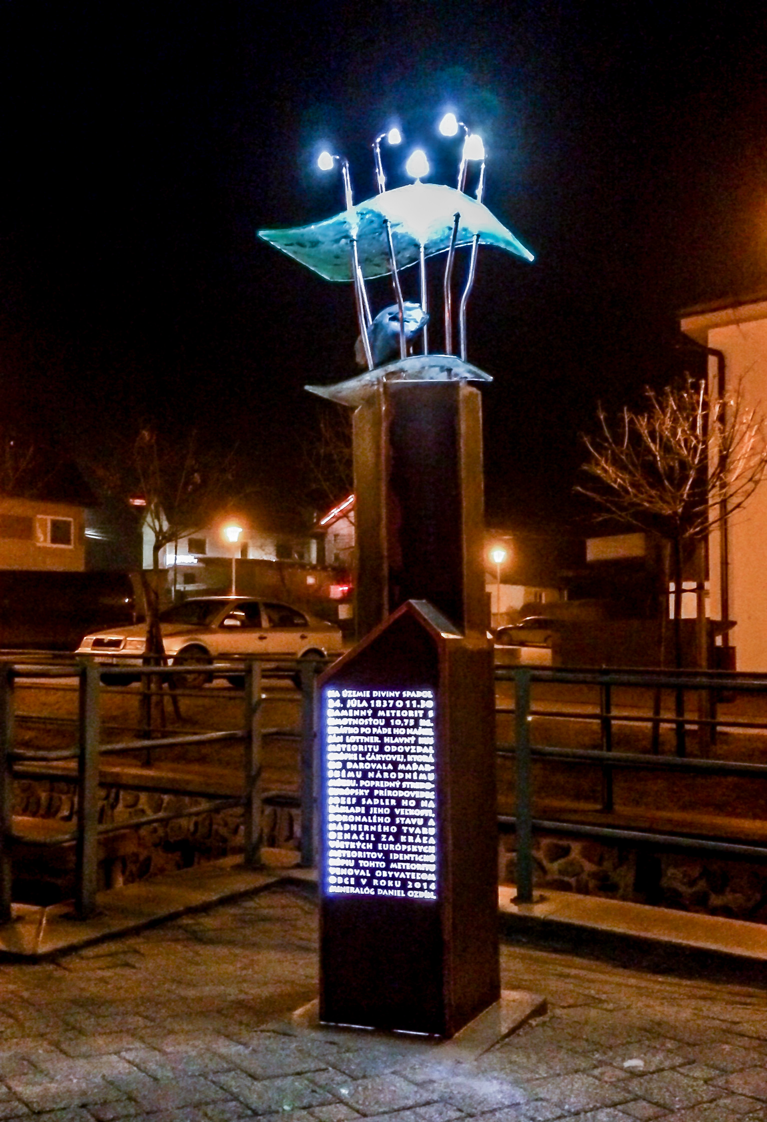 Pamätník divinského meteoritu